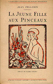 Couverture du roman "La jeune fille aux pinceaux"